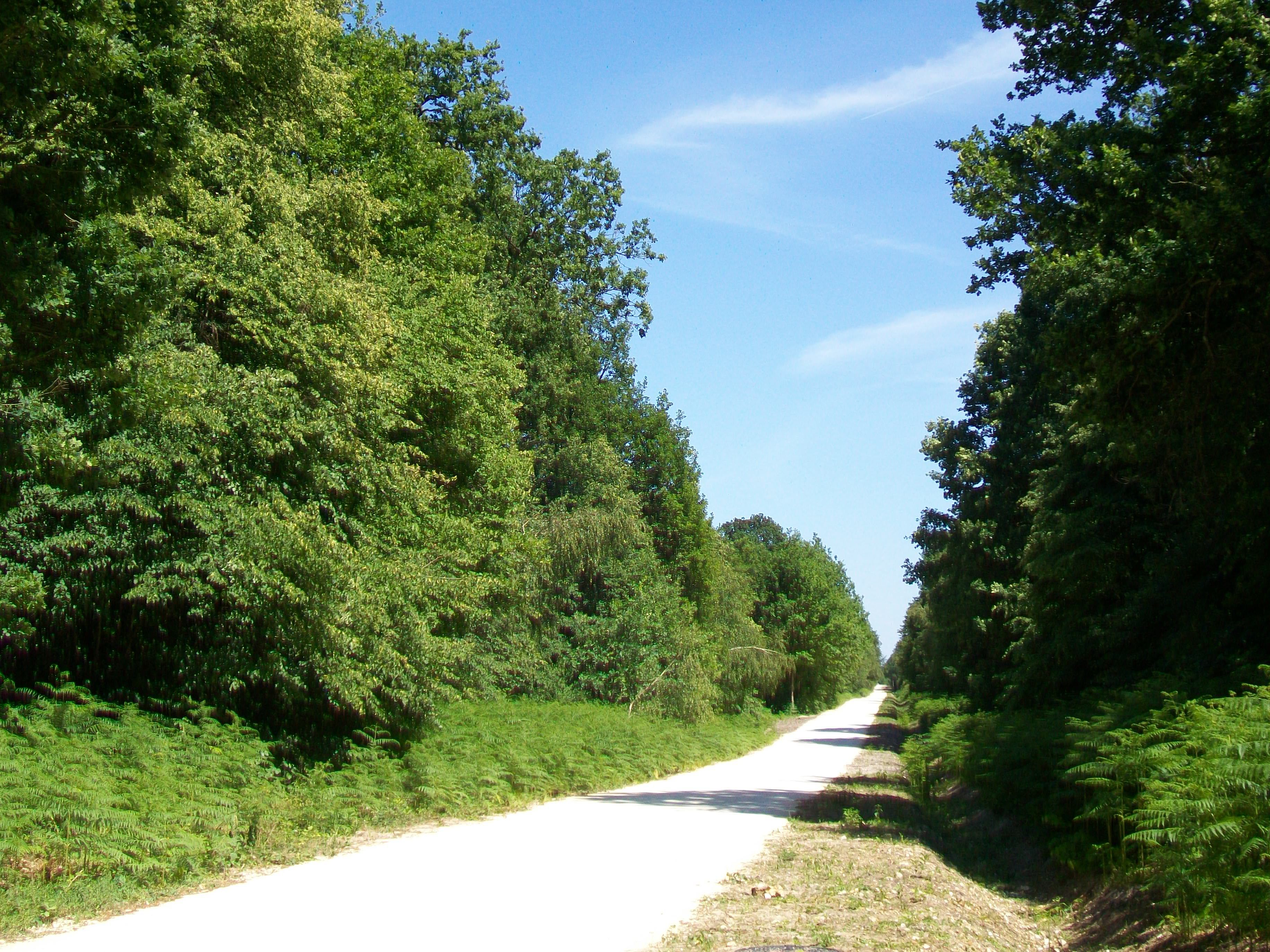 Le bois de Bonnet, situé principalement sur la commune d'Asnières-sur-Oise (Val-d'Oise) ; route de Royaumont. C'est la principale route forestière, traversant le bois en ligne droite de l'est à l'ouest. Elle vient d'être refaite par l'ONF.